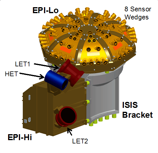 Parker Solar Probe Diagram instrument ISIS